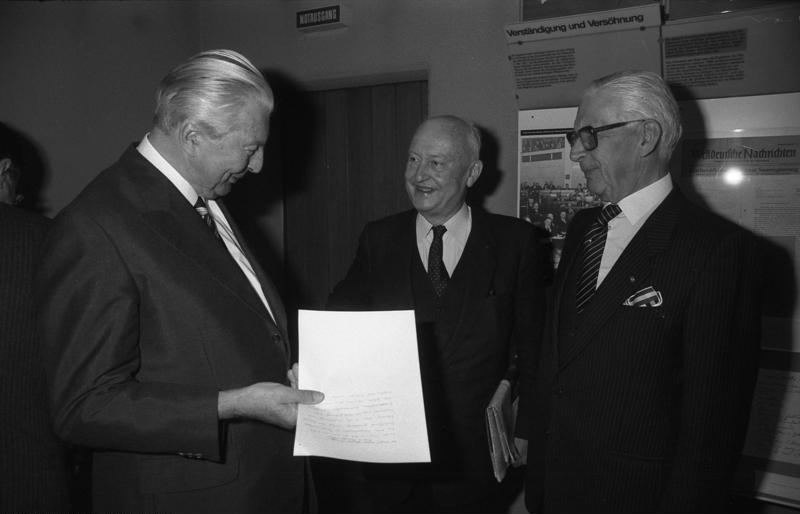 3.11.1983 Wissenschaftliche Tagung der Stiftung Bundeskanzler-Adenauer-Haus zum Thema: "Konrad-Adenauer und die deutsch-französischen Beziehungen" anläßlich des 20. Jahrestages der Unterzeichnung des deutsch-französischen Vertrages im Adenauer-Haus in Bad Honnef-Rhöndorf.